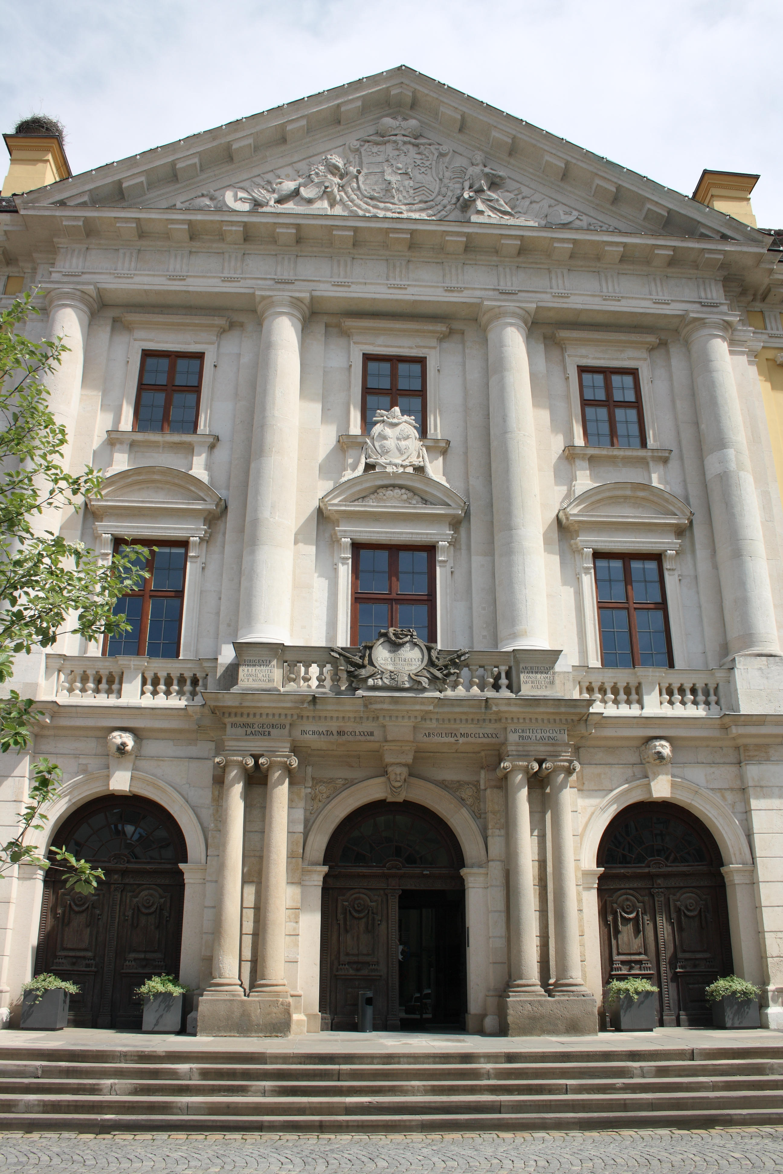 Rathaus mit Wappen des Kurfürsten Carl Theodor von Bayern in Lauingen, einer Stadt im Landkreis Dillingen an der Donau (Bayern)